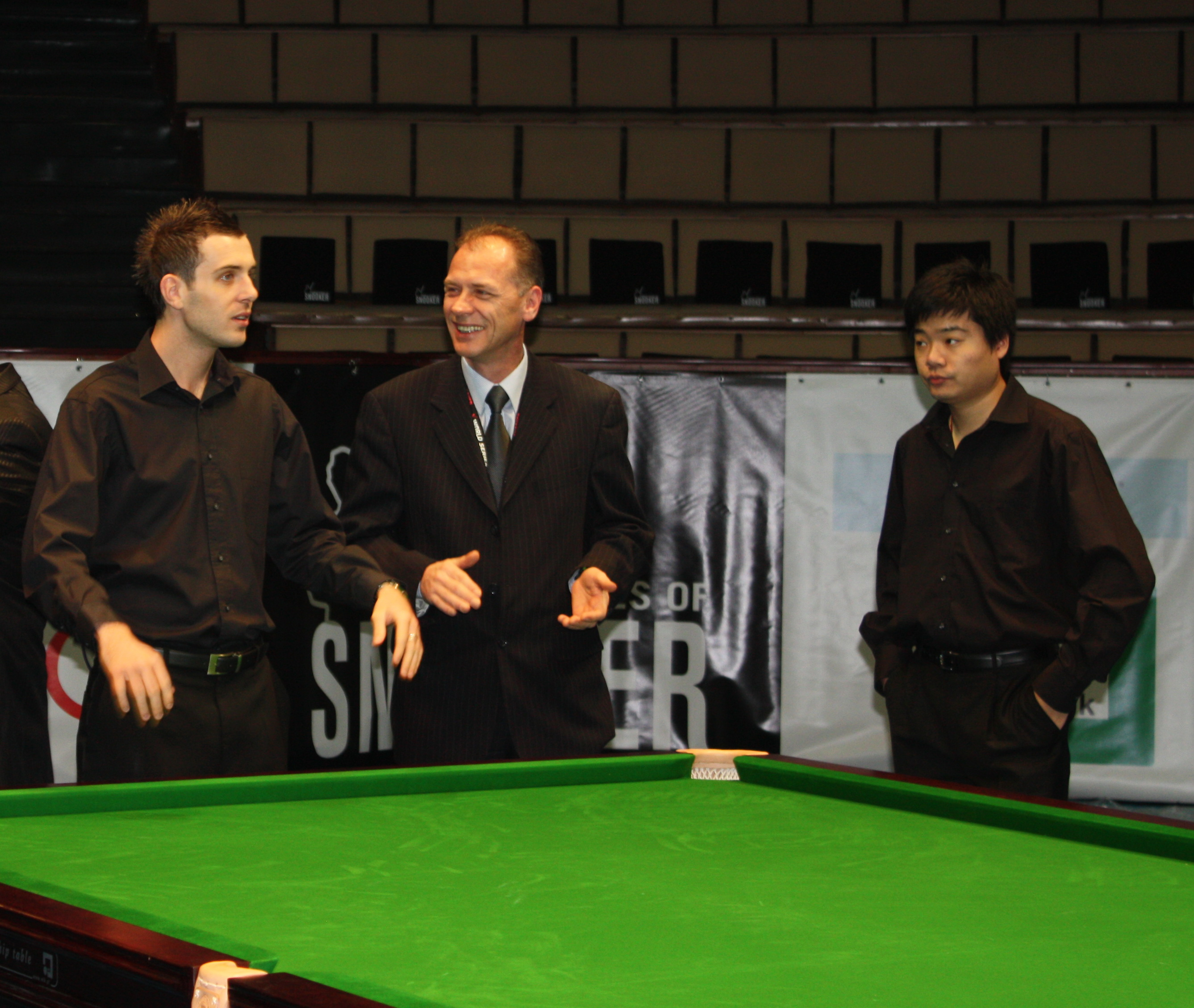 Туринир World Series of Snooker в Москве